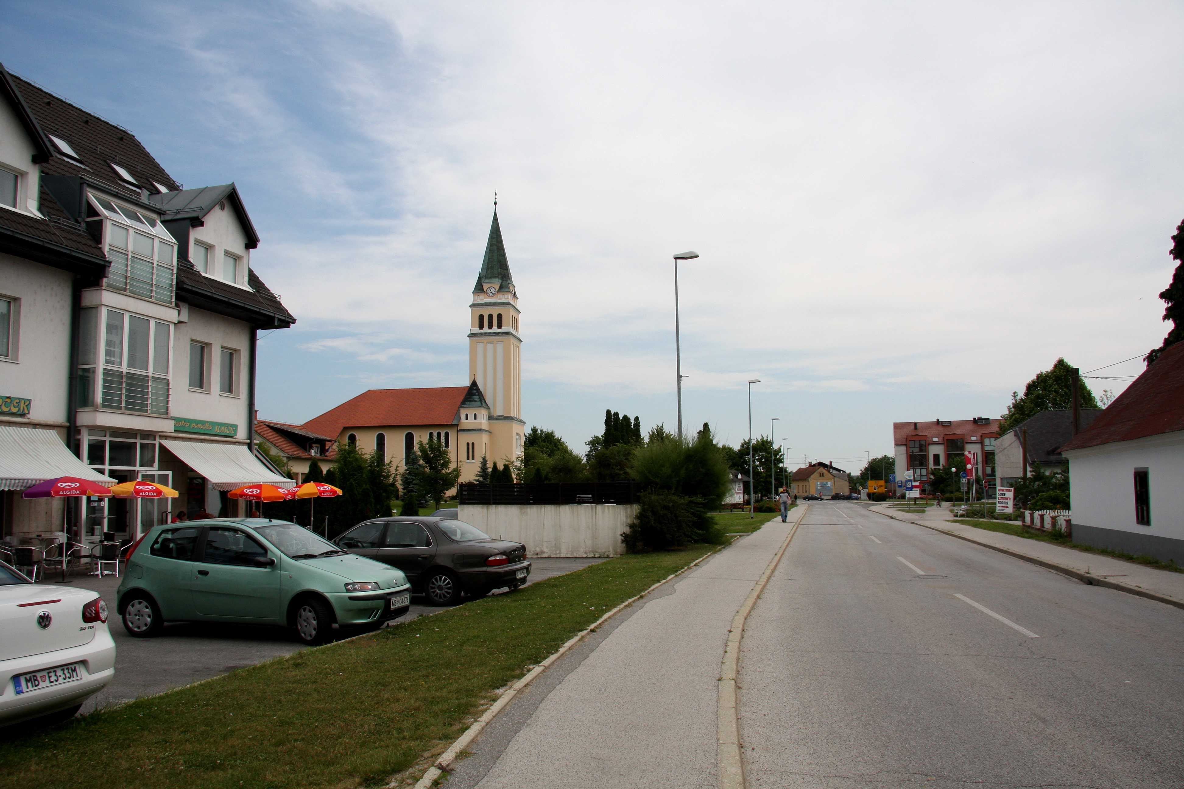 Moravske Toplice, Slovenija